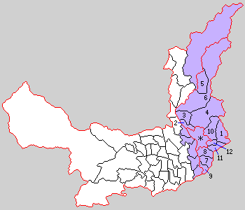 山梨県西山梨郡の町村。